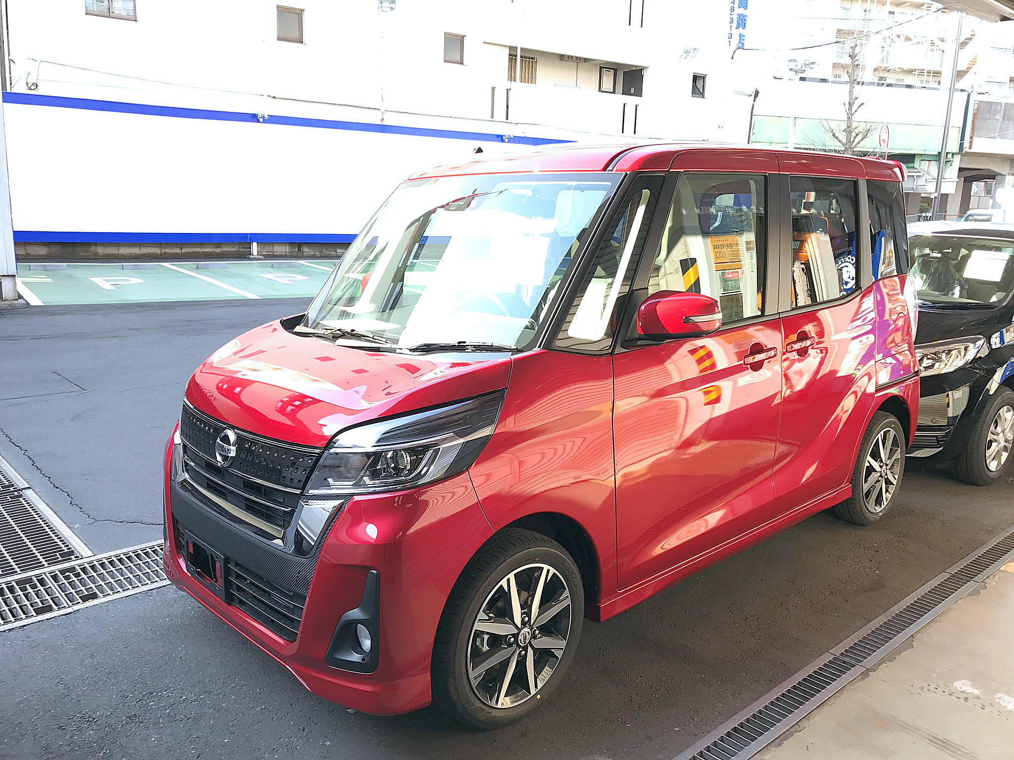 日産 デイズルークス ハイウェイスター